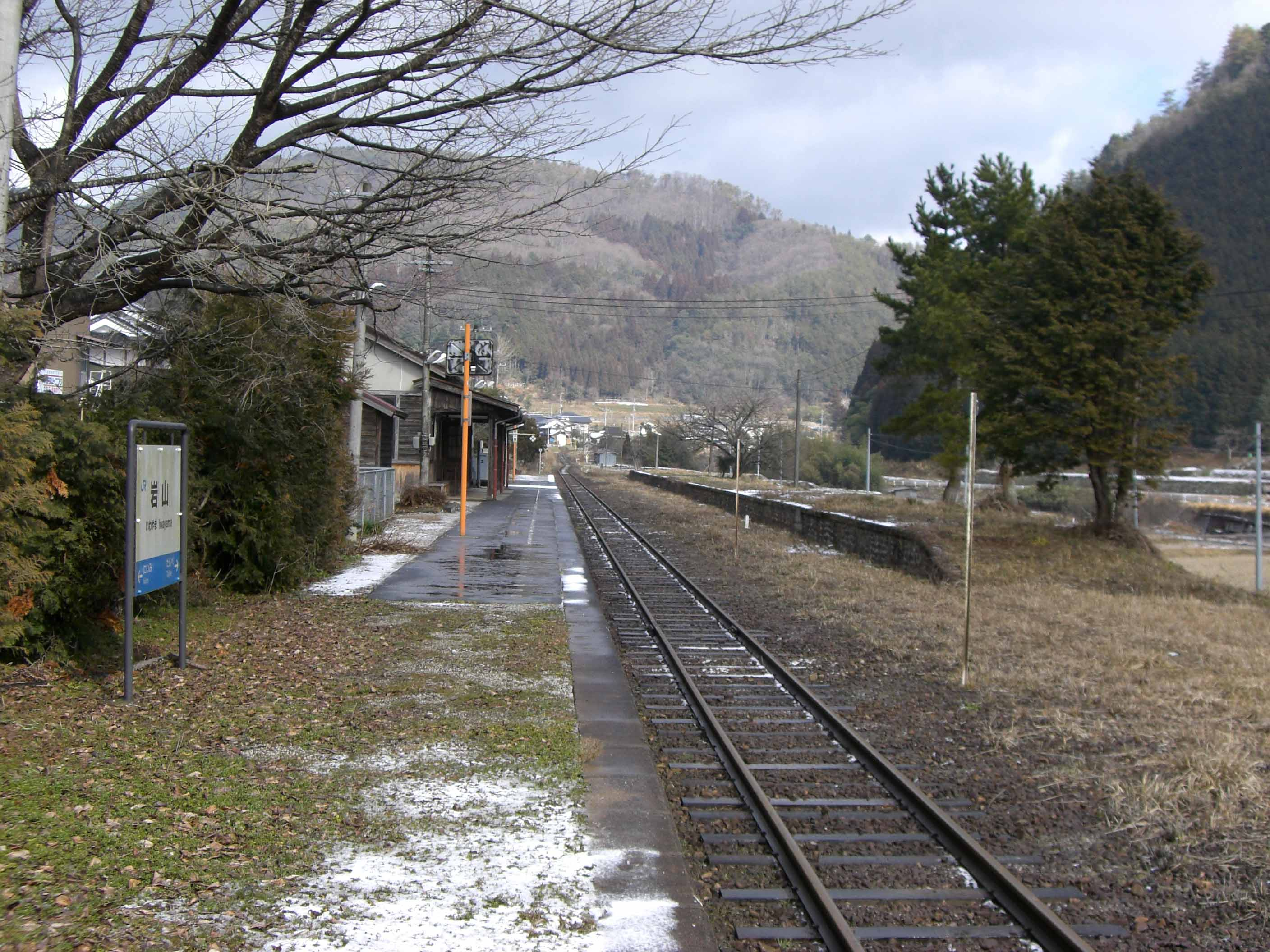 西日本旅客鉄道（JR西日本）姫新線岩山駅の構内の様子